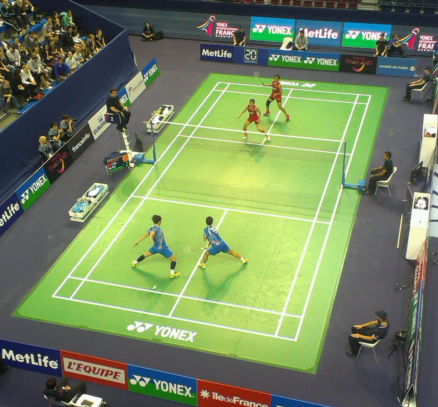 Internationaux de France de badminton 2016 - Quarter finals - Women's doubles HUANG Dongping et LI Yinhui contre Greysia POLII et Nitya Kris MAHESWARI [4]